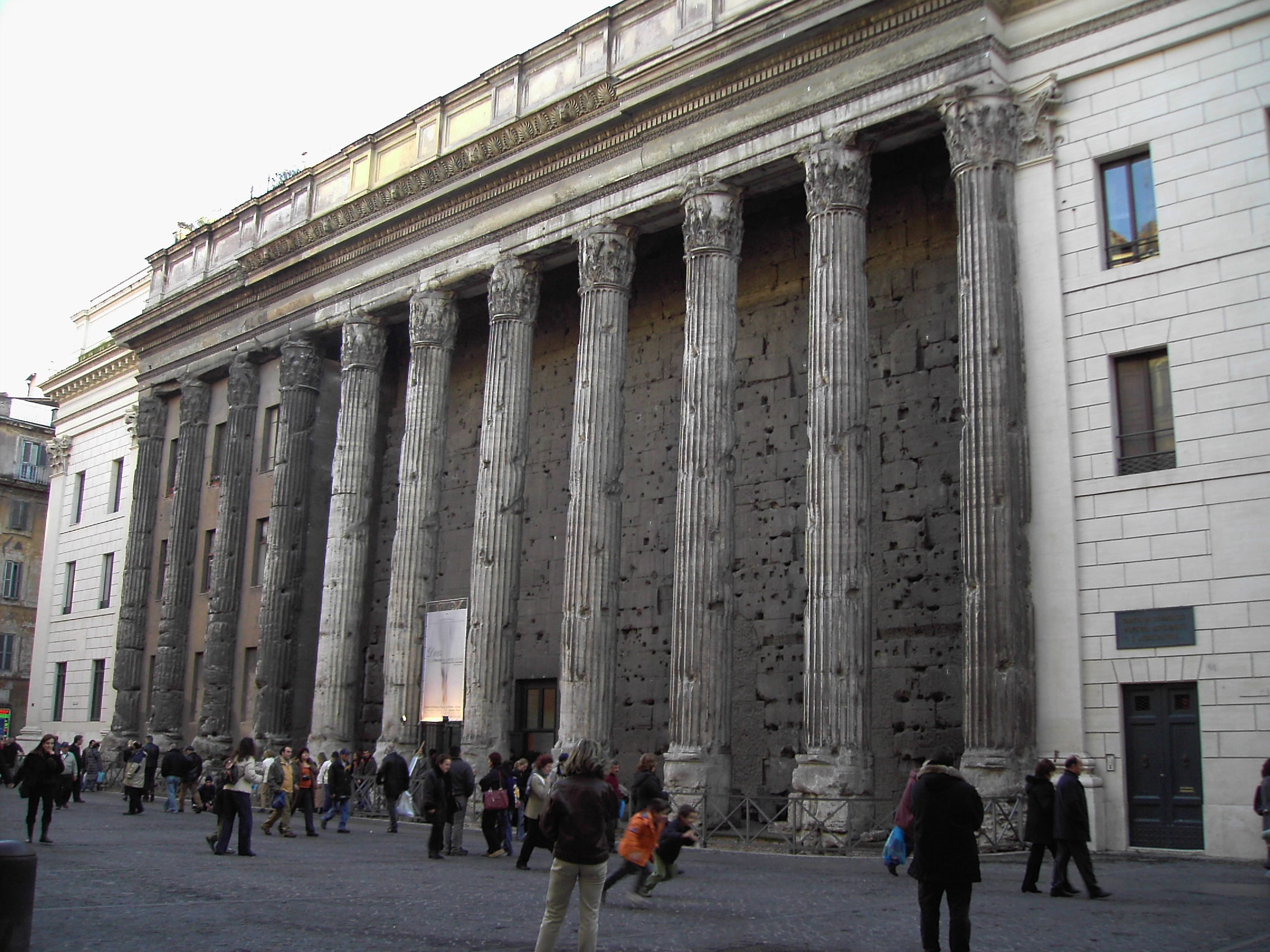 Roma, piazza di Pietra (tempio di Adriano)